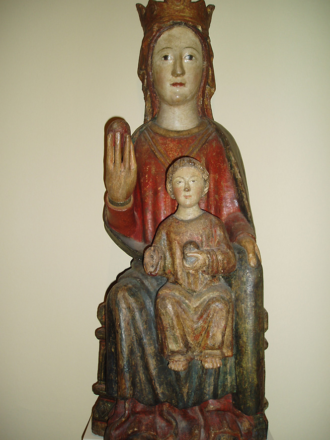 Virgen medieval del Museo de Bellas Artes de Sevilla.